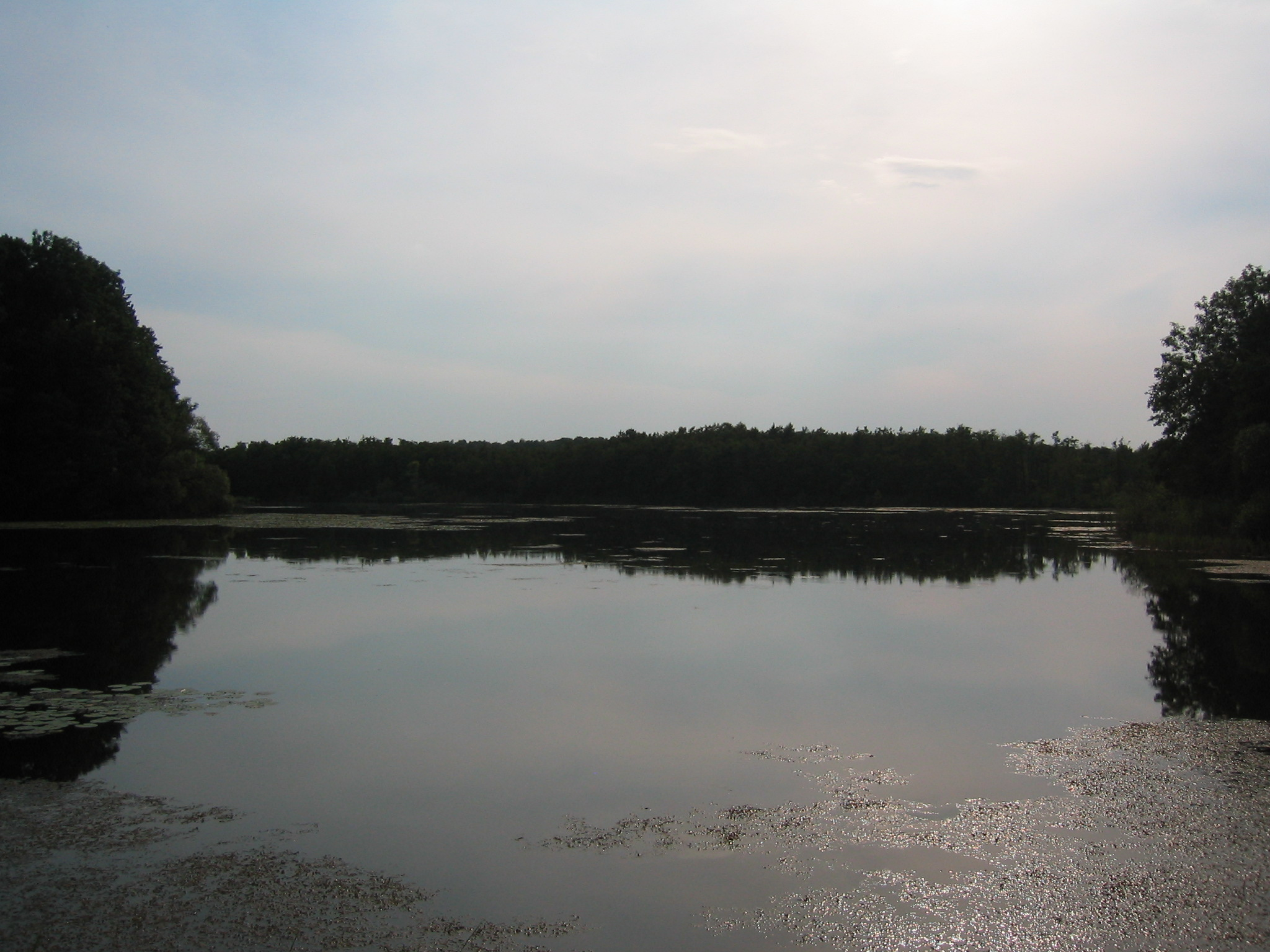 Der Wrechener See